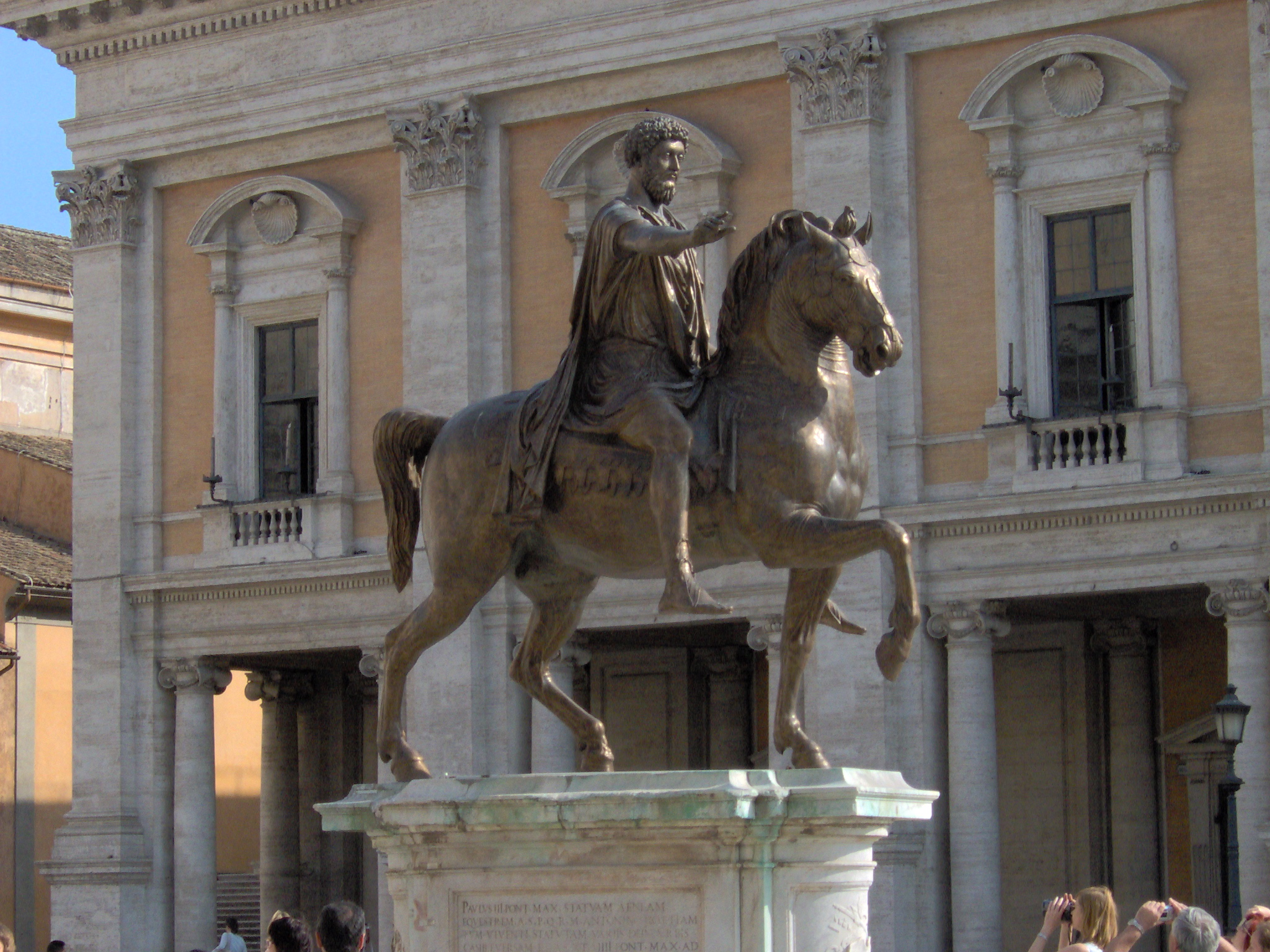 Copia moderna della statua di Marco Aurelio in Campidoglio - Roma